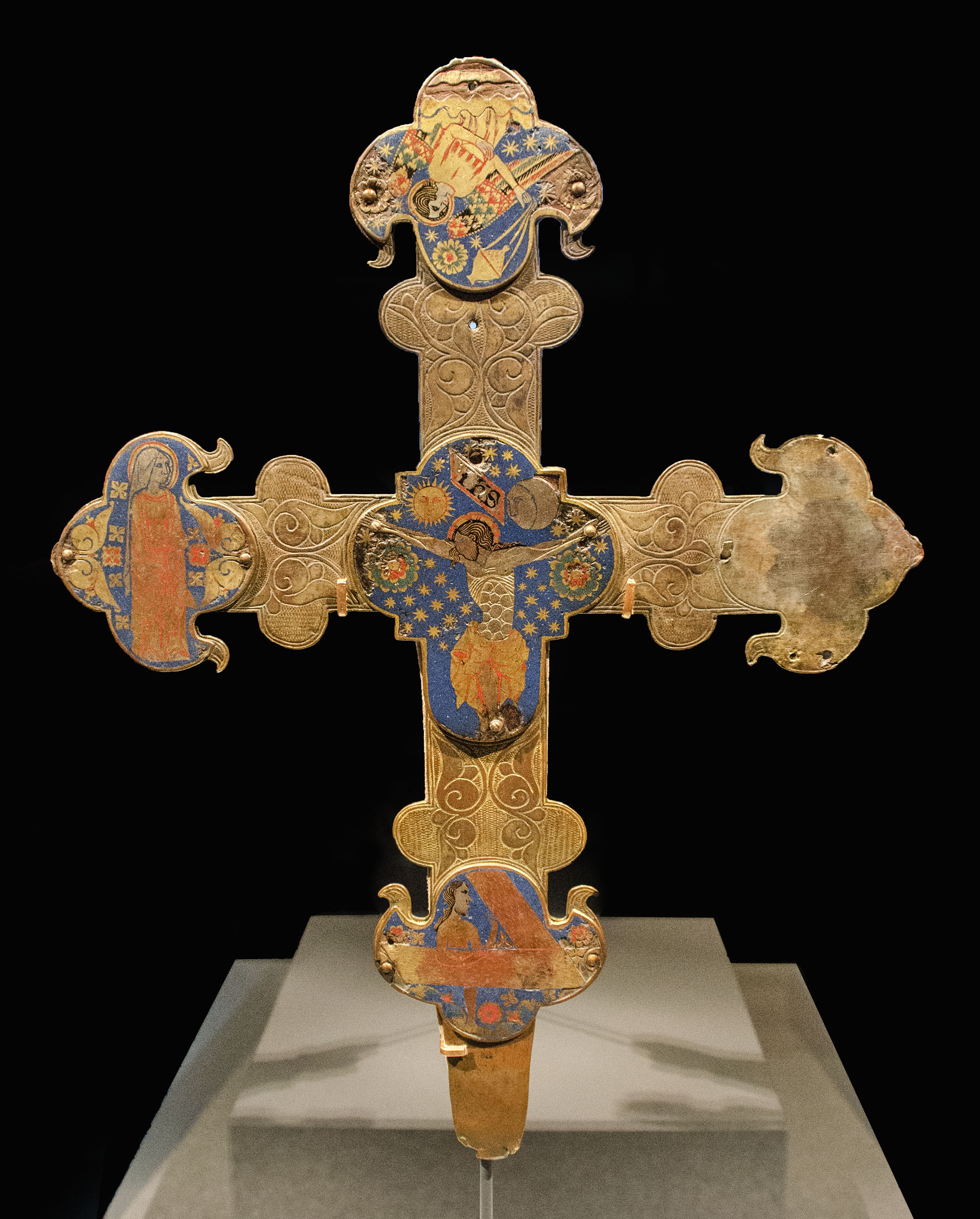 Cruz procesional española datada en el periodo 1300 a 1350. Plata dorada y esmalte. Fotografiada en la exposición Los pilares de Europa, en Caixa Forum Madrid.